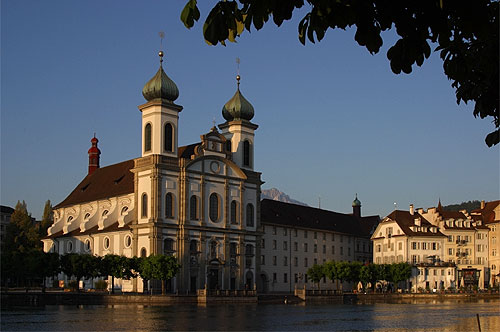 Jesuitenkirche in Luzern (Nr. 03.1-4639)